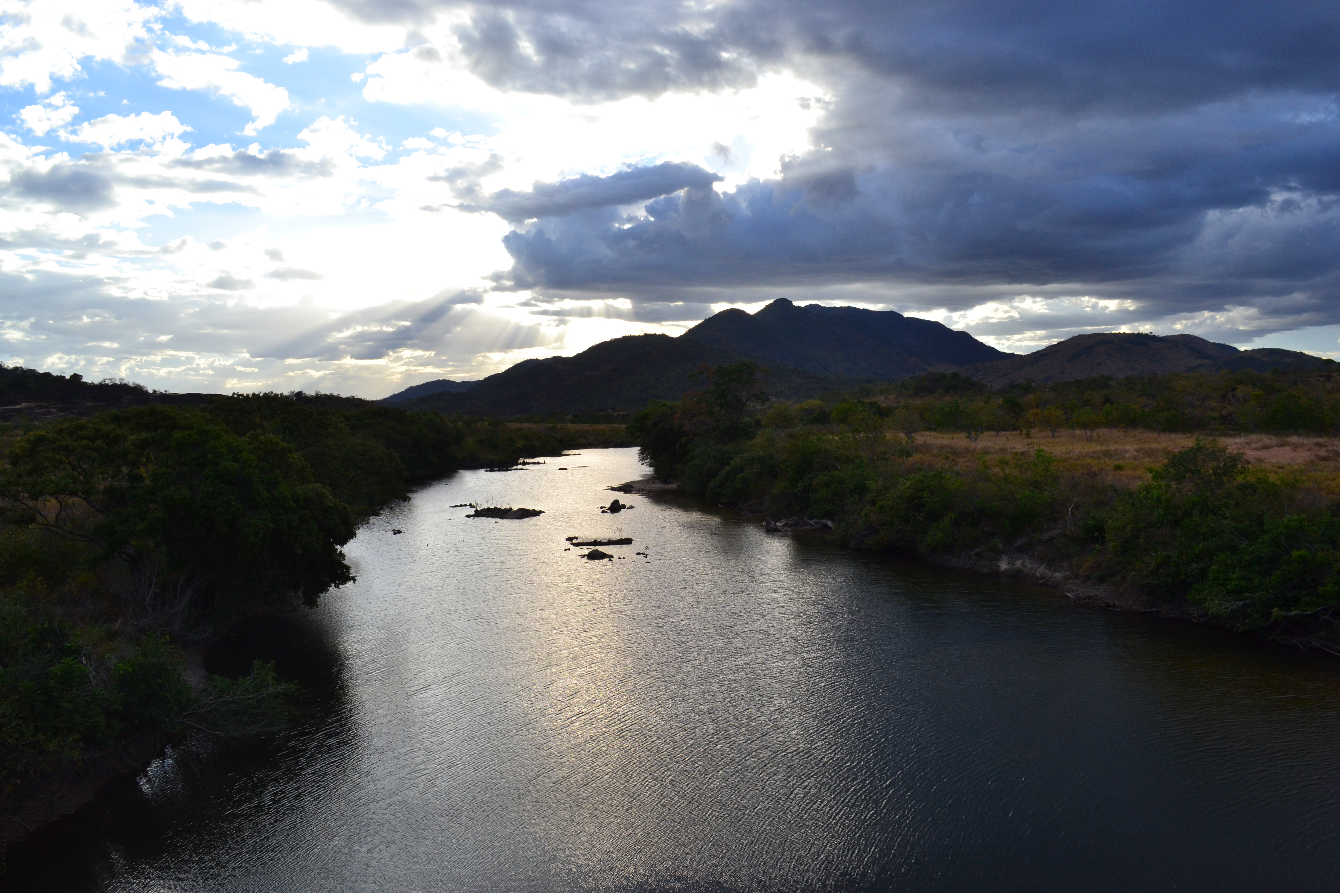 Rio Cotingo, Reserva indígena São Marcos